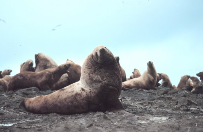 Stellerscher Seelöwe / Ort: Middleton Island, Alaska, Juli 1978